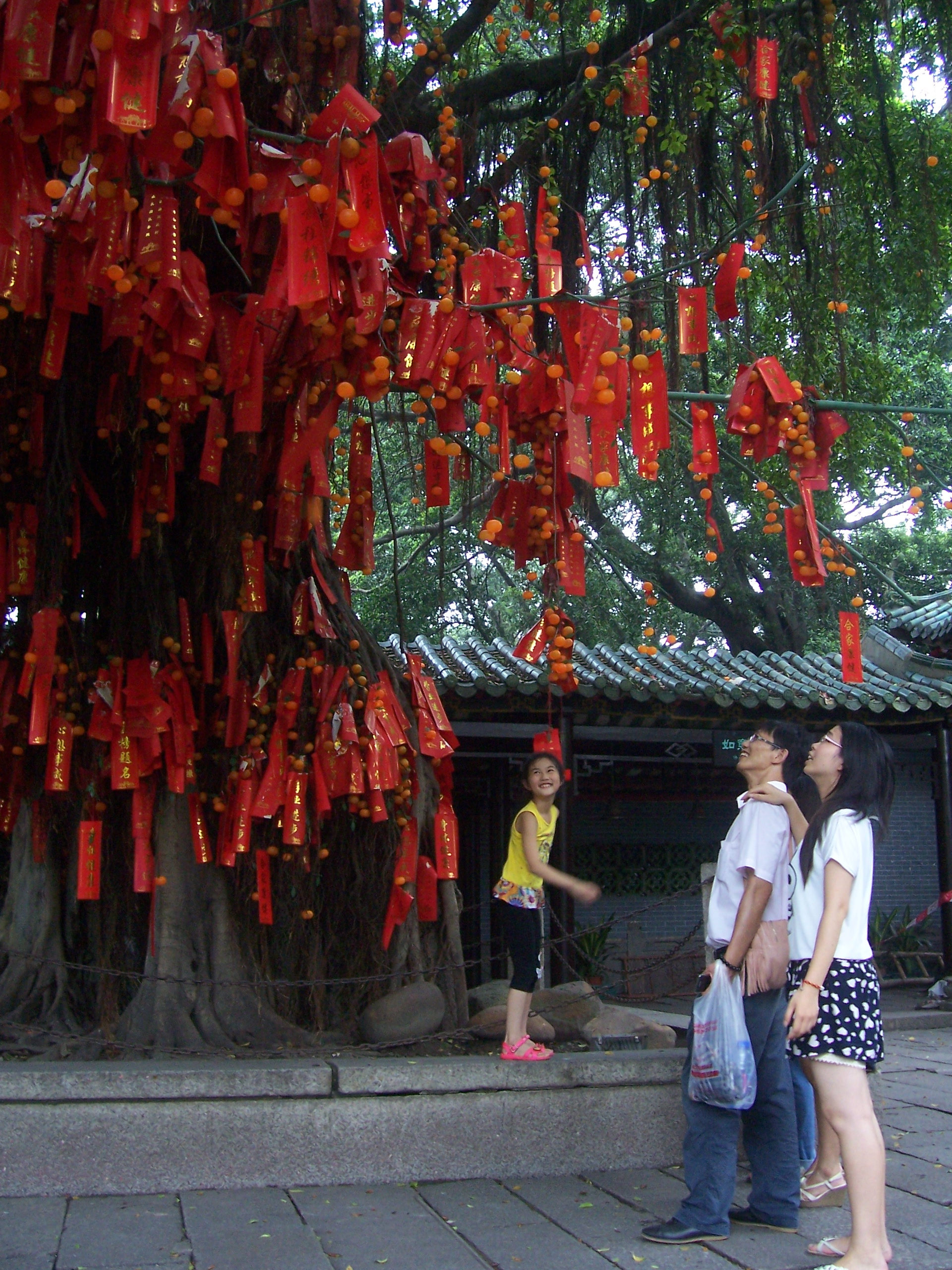 Arbre votif au temple de Foshan.